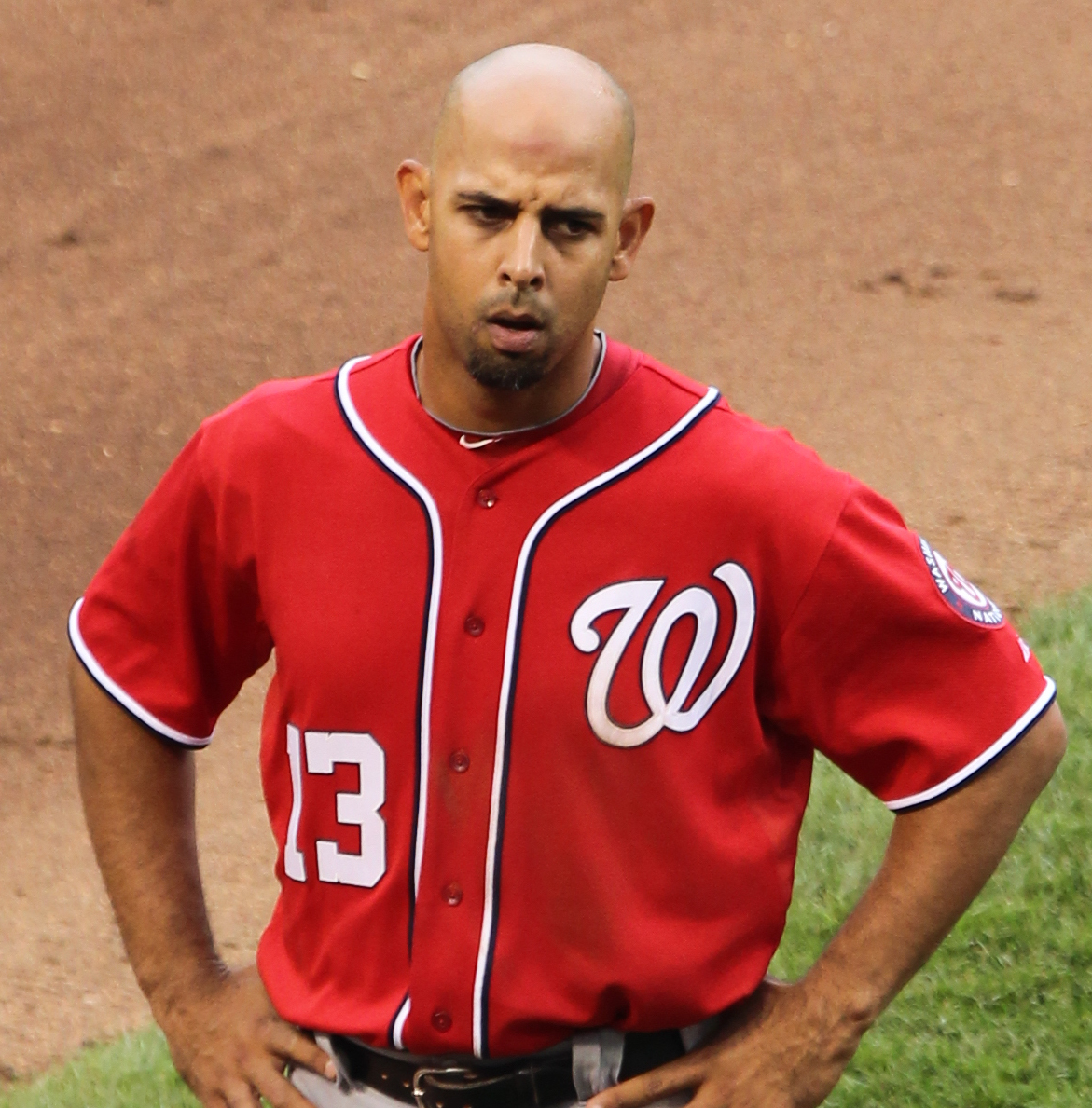 Alex Cora